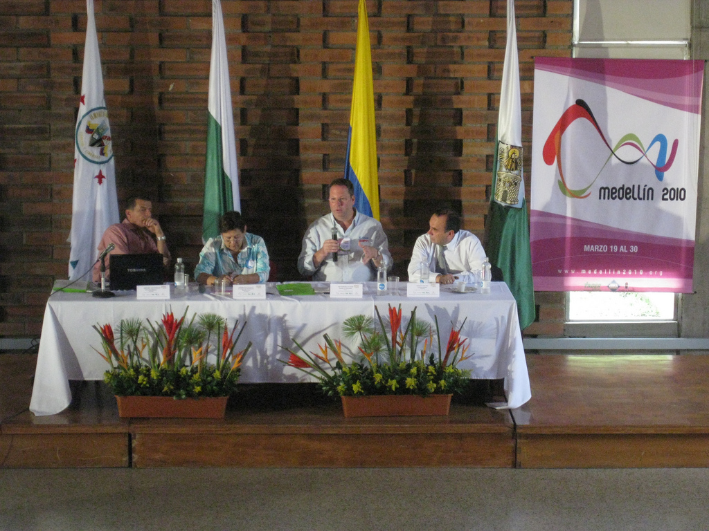 Seminario Internacional de Periodismo Deportivo